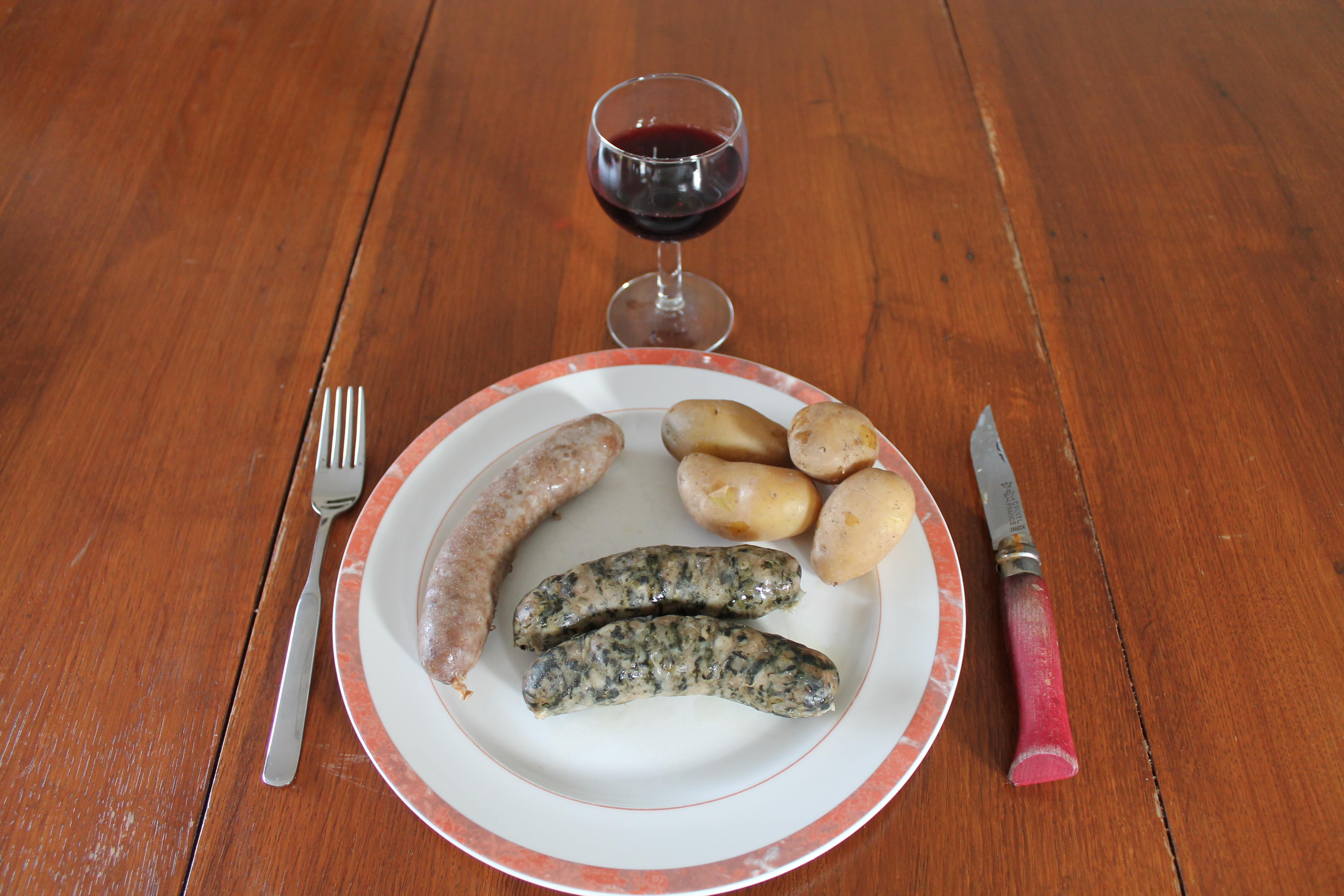 Plat de pormoniers, diots et pommes de terre